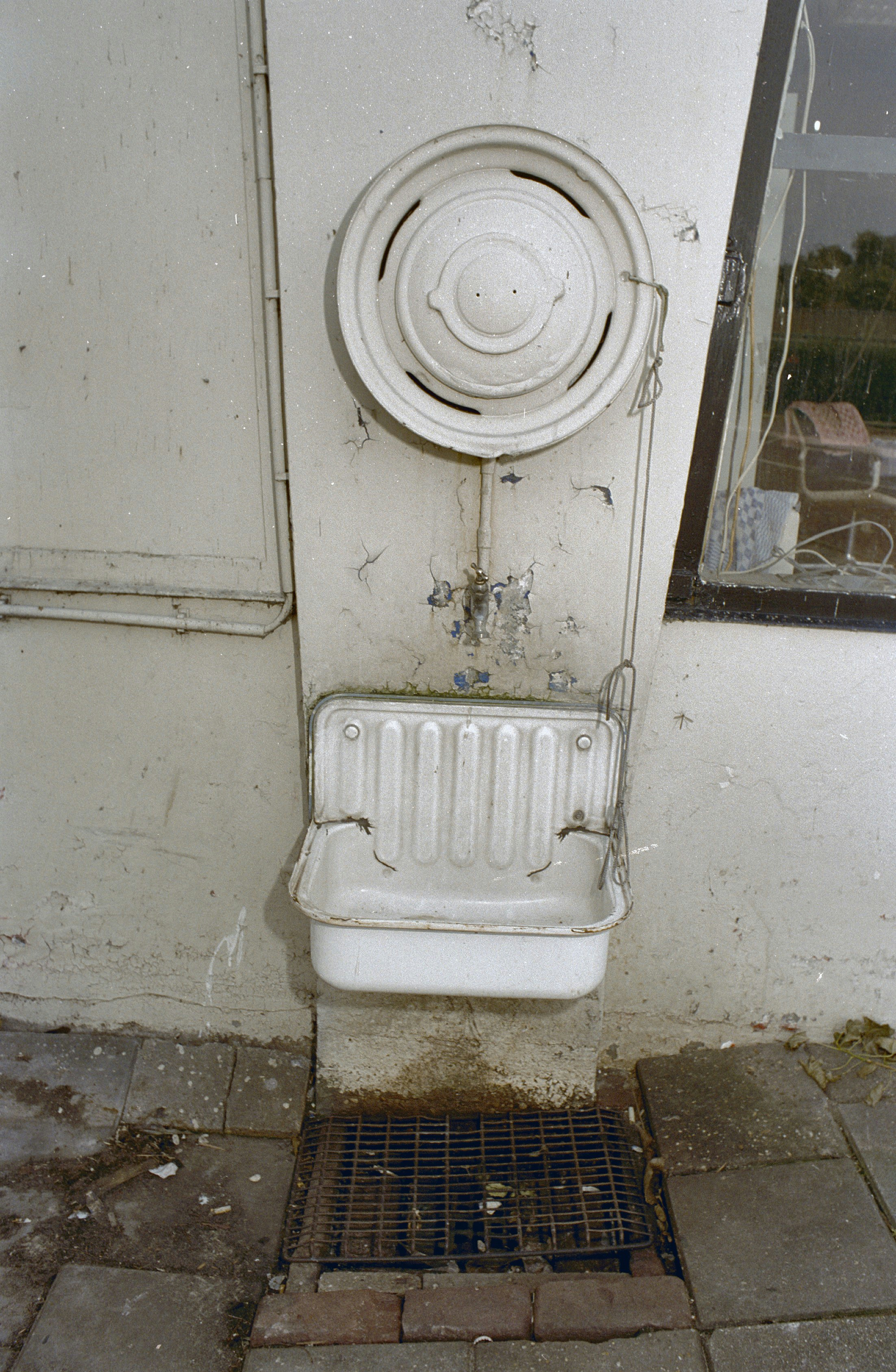 Benzinestation Esso ( Dudok ): Exterieur WATERKRAAN